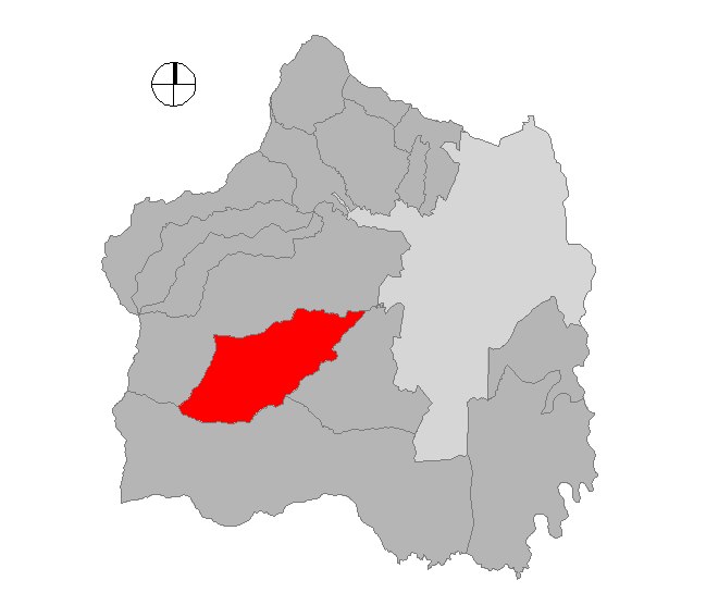 Corregimiento de Cali, Colombia